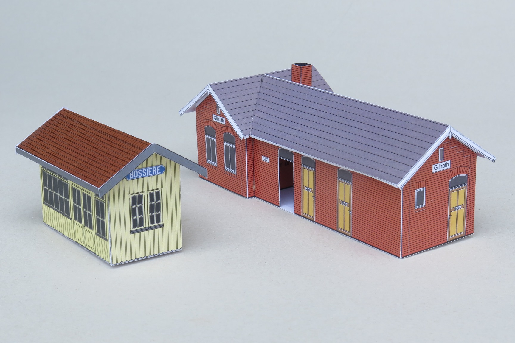 Montierte Bastelbögen in der Nenngrösse H0, im Massstab 1:87, der Haltestelle Bossière in der Westschweiz (links) und des Bahnhofes Gillerath in Nordrhein-Westfalen, Deutschland (rechts). Während das Vorbild von Bossière in Holzbauweise bei Lutry an der Bahnstrecke Lausanne–Bern der Schweizerische Bundesbahnen (SBB) liegt, liegt das Vorbild des Bahnhofes Gillerath Backsteinbauweise an der Museumsbahnstrecke Gillerath–Schierwaldenrath der Selfkantbahn. Das Papiermodell der Haltestelle Bossière ist eine Konstruktion von Hanspeter Stähli, das Papiermodell des Bahnhofes Gillerath eine Konstruktion von Roland Wurdak.